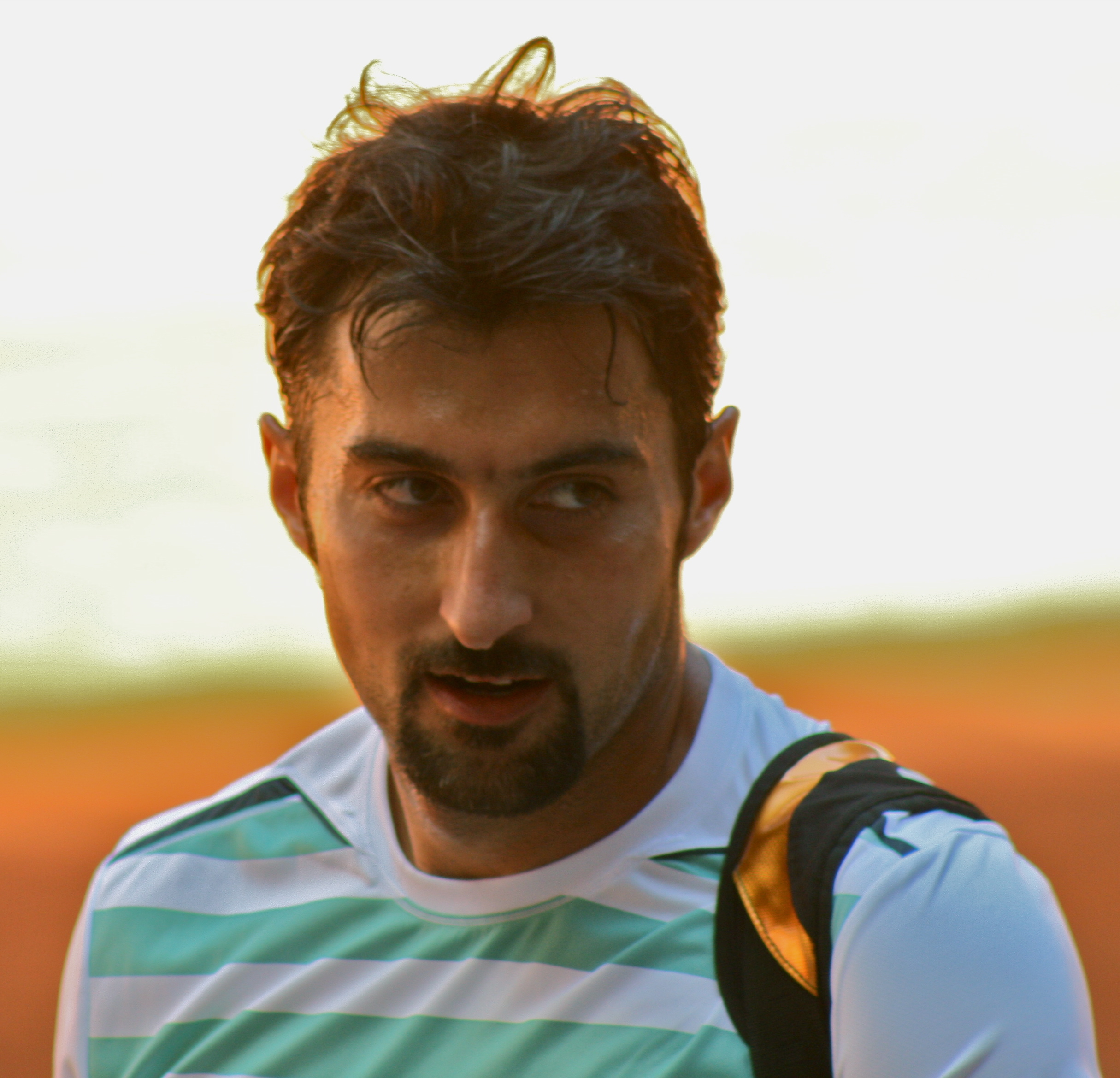 Ненад Зимоњић - озбиљан Caja mágica - Madrid Open 2009